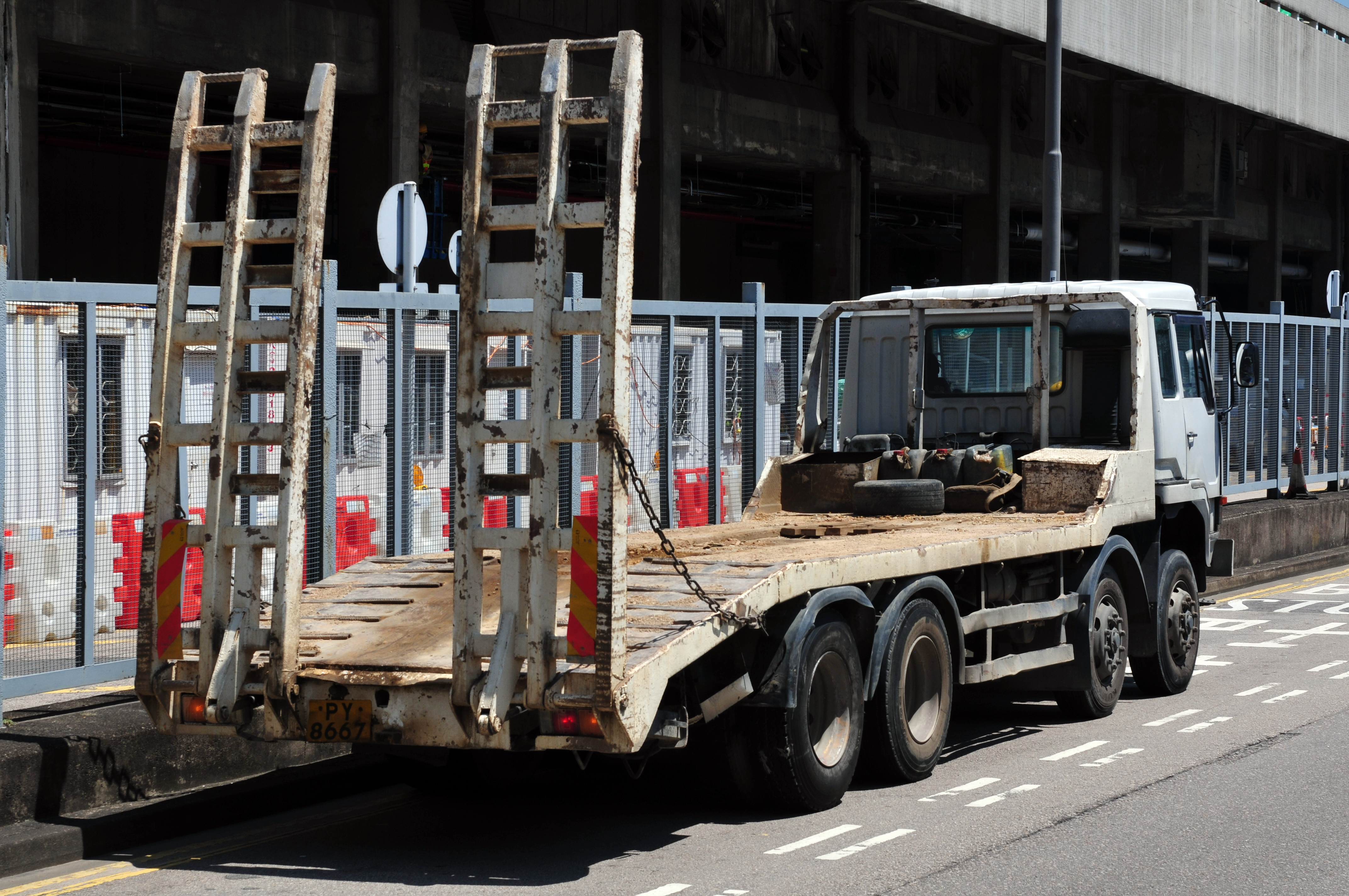 Wikimania 2013 Hongkong